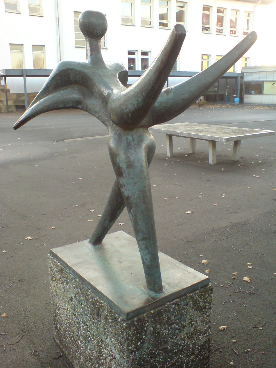 Details der Skulptur "Wippe" von Ewald Brandt, 158 aufgestellt bei der Hoffmann-von-Fallersleben-Schule, heute auf dem Schulhof der Erich-Kästner-Schule in Hannover, Groß-Buchholz, Ebelingstraße 3. Die bescheidene Bild-Qualität des Foto-Handys bittet der "Urheber" höflich zu entschuldigen - bei der besseren Kamera waren ausgerechnet vor Ort die Akkus leer!